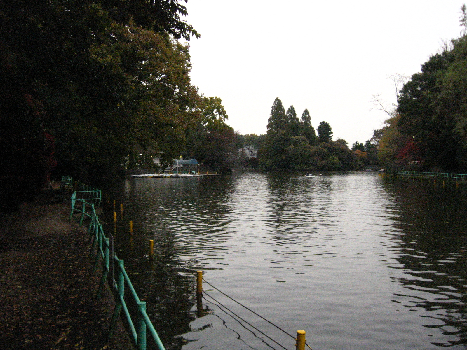 Musashizeki-park